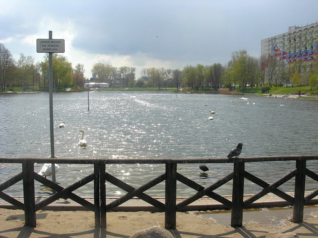 Balaton Bydgoszcz